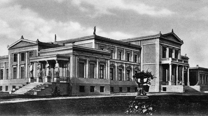 Дворец Кляйн Байнунен